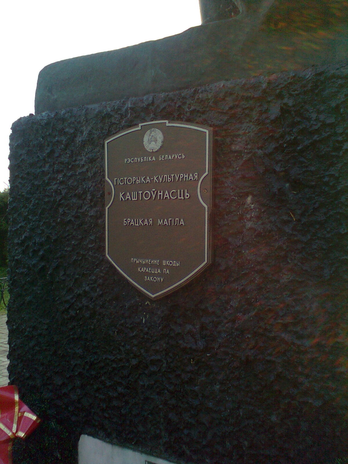 Братская могила - Охраняется государством.